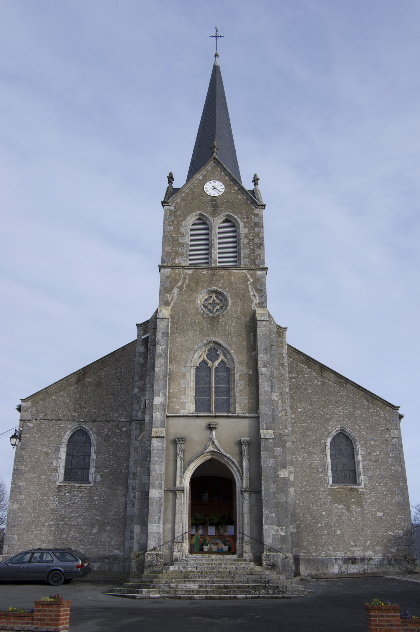 Église Saint-Jean-Baptiste, Tavers, Loiret, France